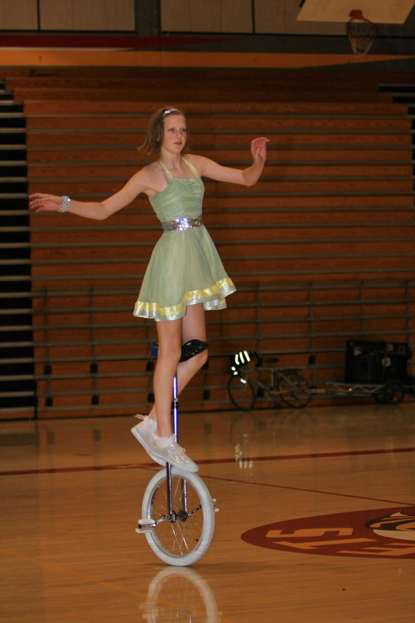 At U Games 2010.